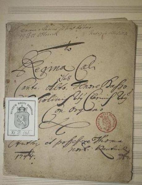 Rukopis skladby Regina Coeli Tomáše Norberta Koutníka